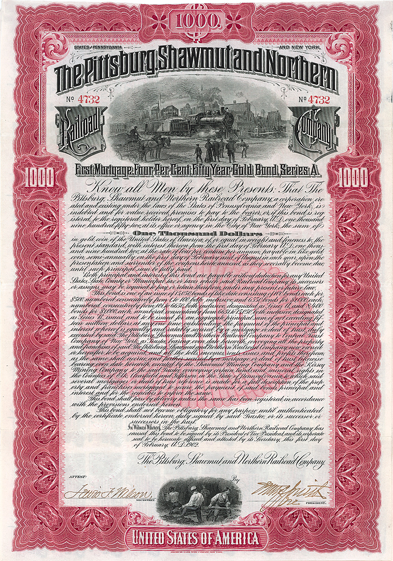 Bond of the Pittsburg, Shawmut and Northern Railroad Company from the 1st February 1902